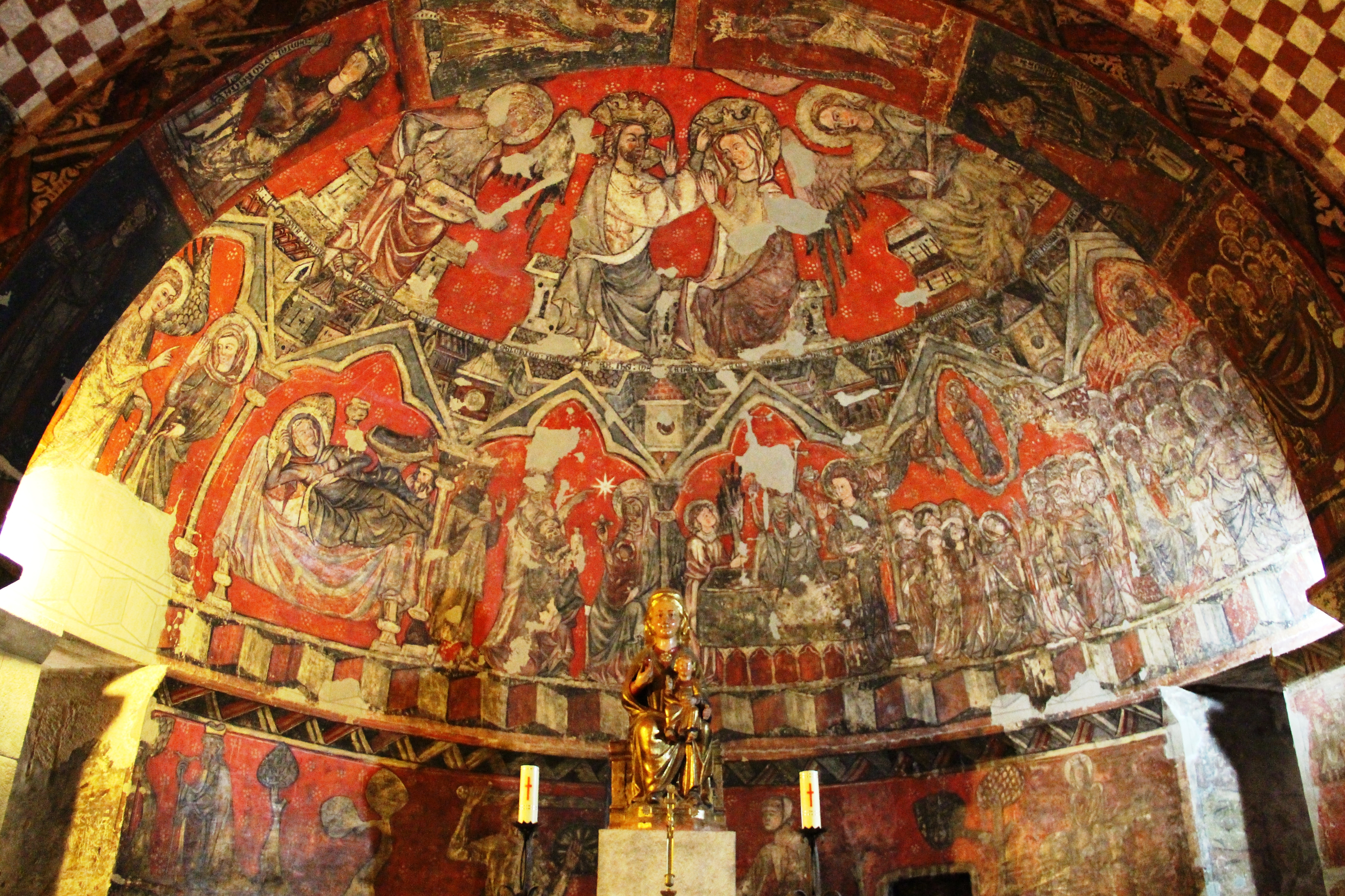 Iglesia Parroquial de San Esteban